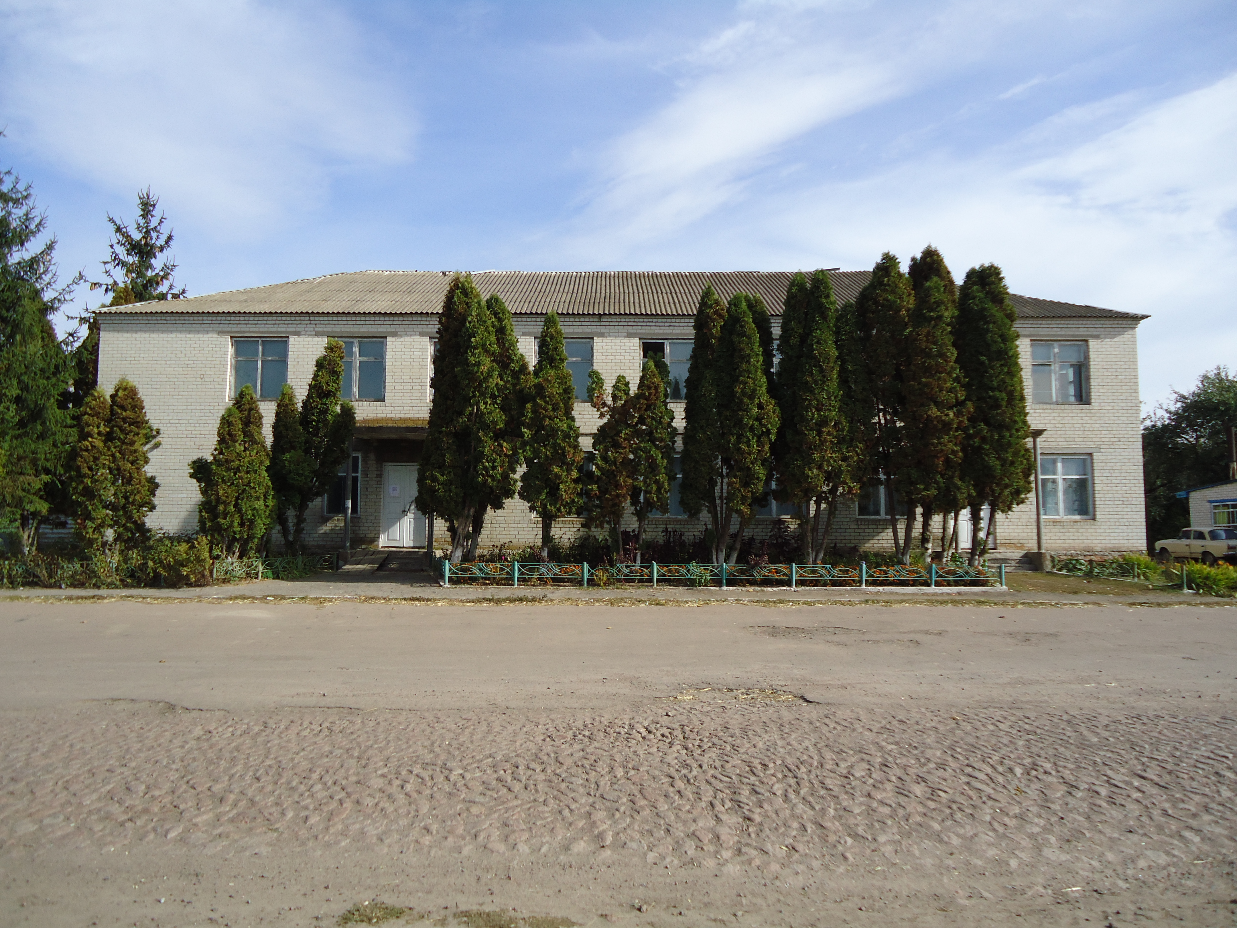 Фото Сільської ради с. Савинці Срібнянського р-ну, Чернігівської обл.